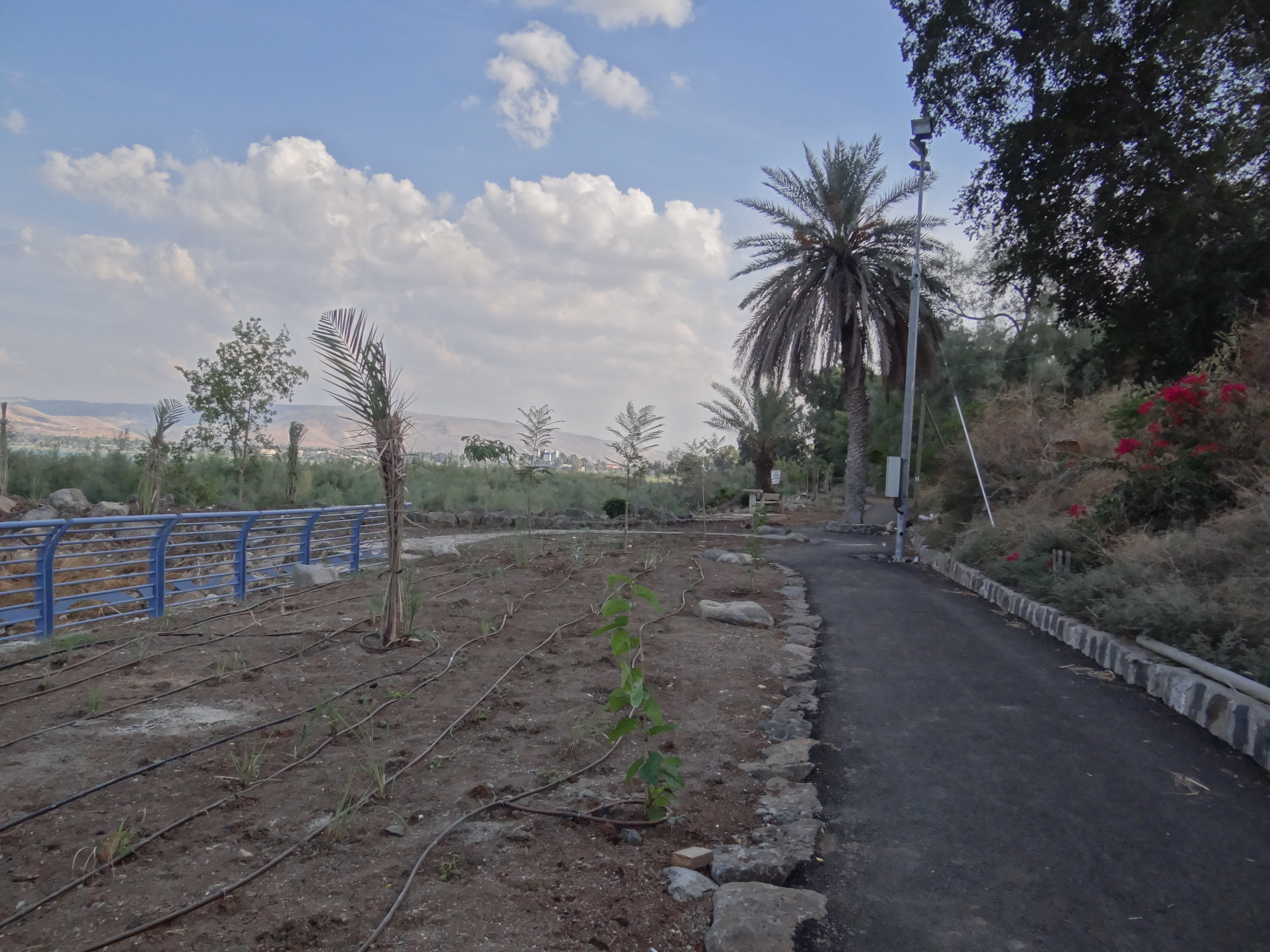 Kinneret Trail, Israel שביל סובב כנרת, אותו יזמה החברה להגנת הטבע, הוא פרויקט אשר מטרתו יצירת שביל, תוך כדי הסרת גדרות ומכשולים אחרים, ואשר יאפשר הליכה מסודרת ובאופן חופשי סביב אגם הכנרת. השביל מסומן בסימון שבילים לבן-סגול-לבן. צילומים בקטע השביל ליד תל בית ירח ואוהלו